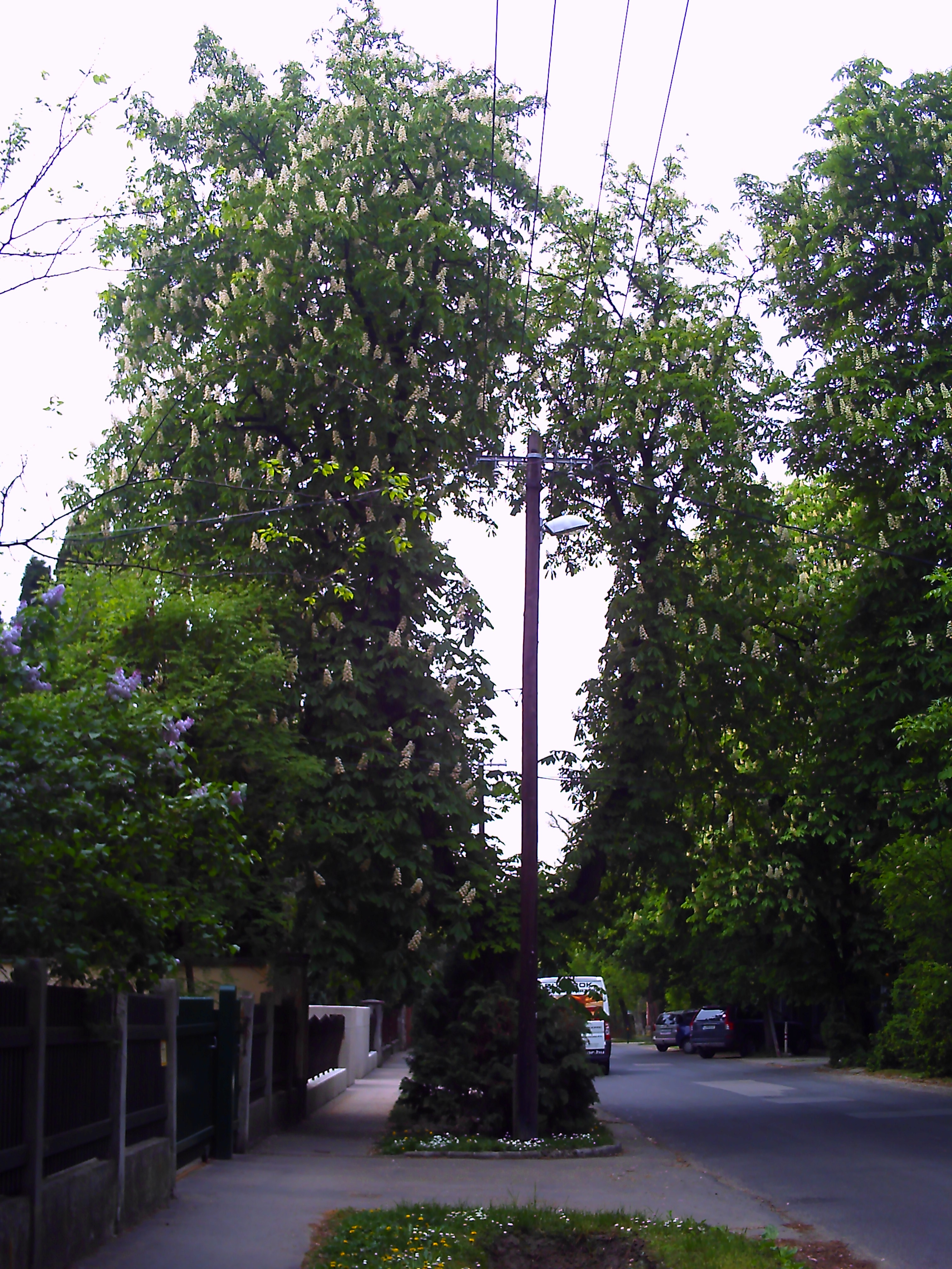 Vadgesztenyefa, Budapest XVI. kerületében, Mátyásföldön. A városrész jellegzetes fája. Lombkoronájának alakját sokszor a köztük futó villanyvezetékekhez igazítják.